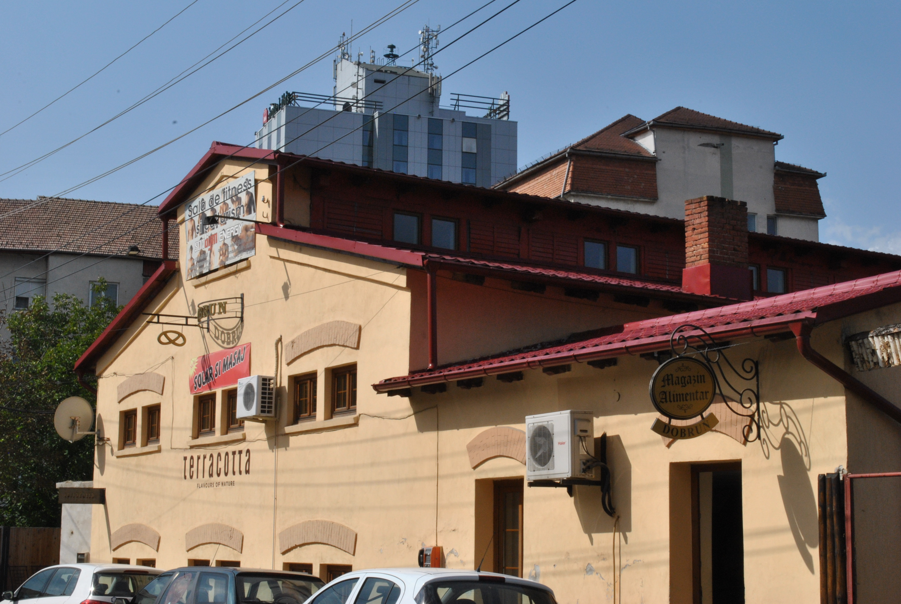 Fosta Manutanță, sec. XIX